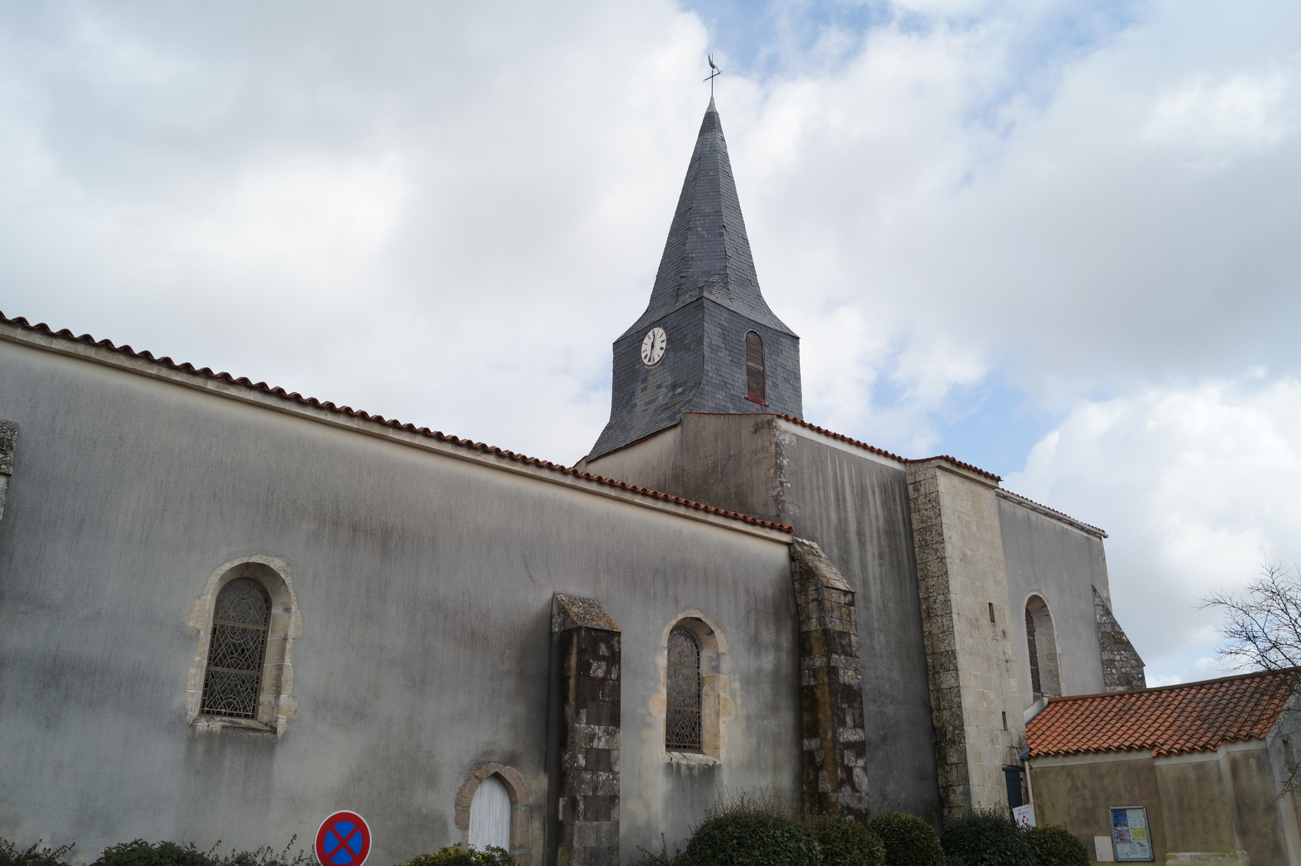 L’église Saint-Cyr-et-Sainte-Julitte de Saint-Cyr-en-Talmondais depuis la rue de la Tillauderie.